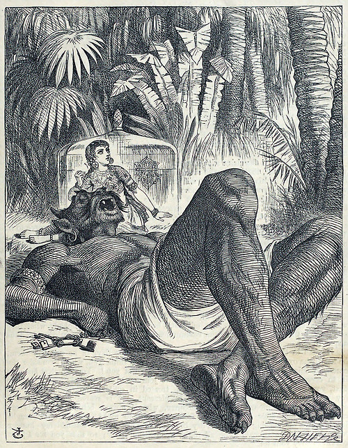 The sleeping genie and the lady. From the Arabian Nights